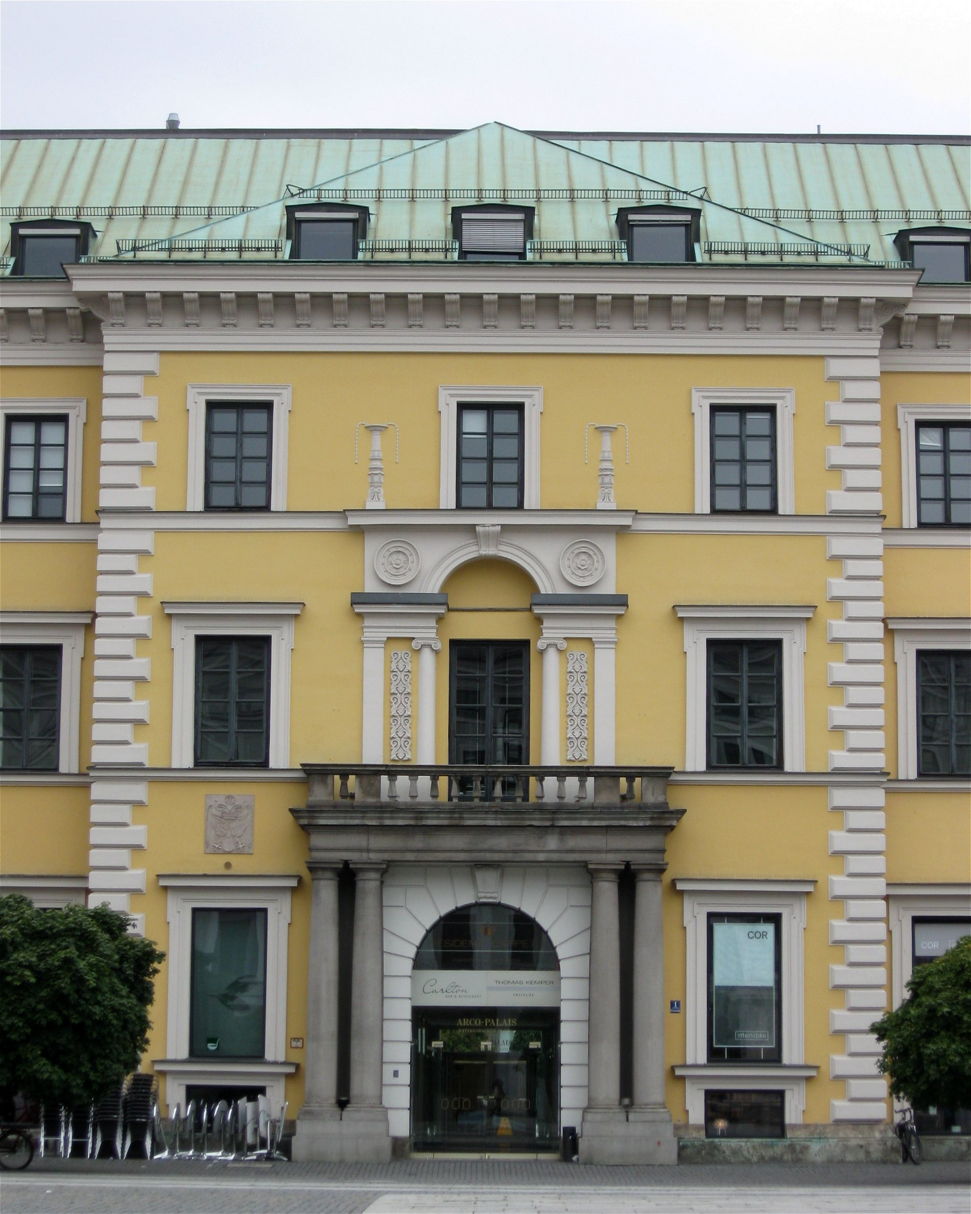 Wittelsbacherplatz 1. Ehem. Adelspalais, sog. Palais Arco-Zinneberg, dreigschossiger Walmdachbau mit Stuckfassade und Mittelrisalit, von Leo von Klenze, 1824/25, Rekonstruktion nach Kriegszerstörung 1959/60 mit originalem Säulenbalkon, Inneres modern.